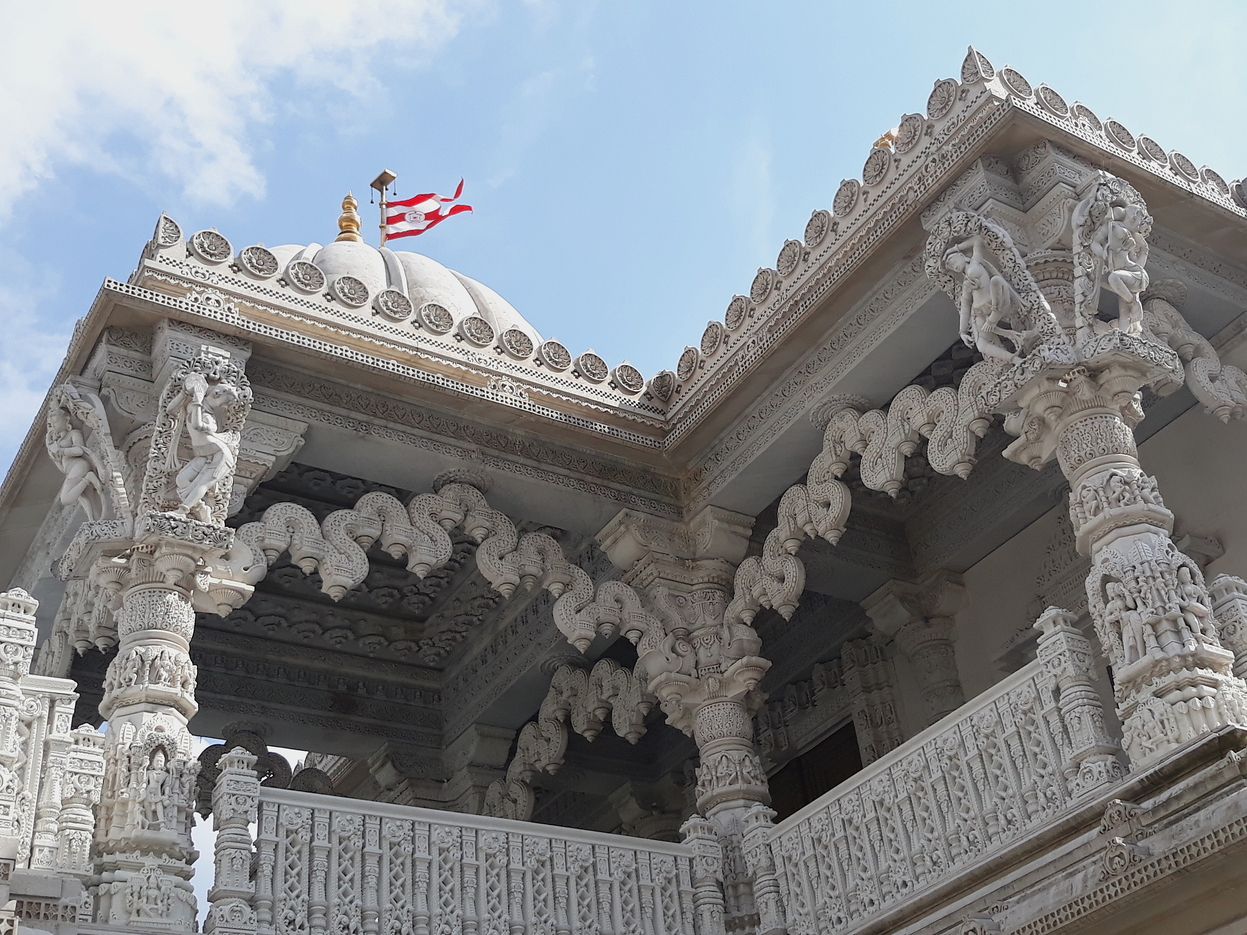 Dettaglio del Shri Swaminarayan Mandir di Londra